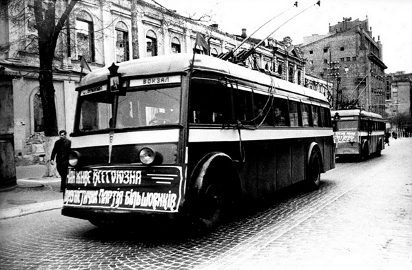 Тролейбуси ЯТБ-2 прямують за маршрутом №2